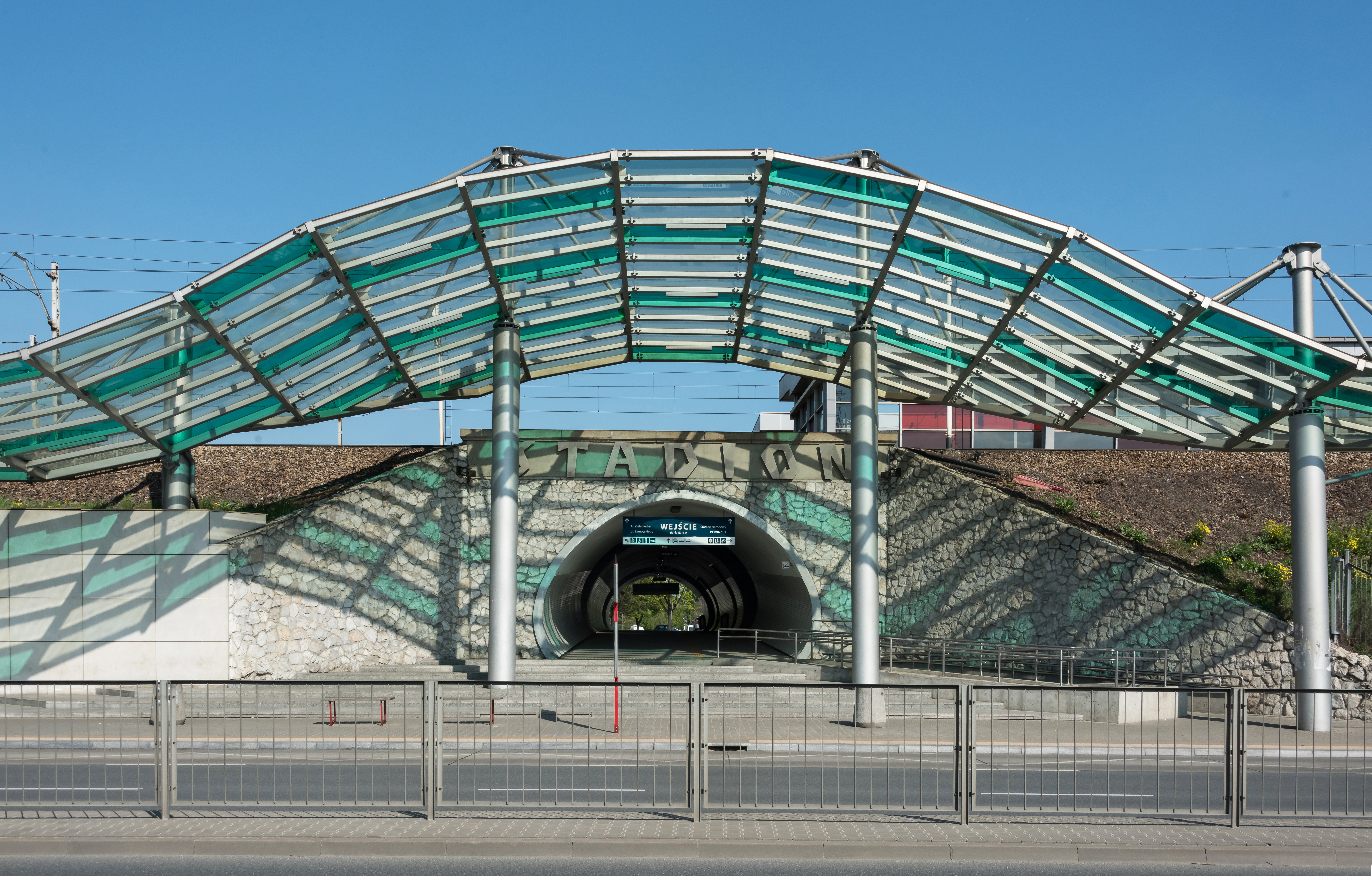 Wejście na przystanek kolejowy Warszawa Stadion od strony ul. Skokolej